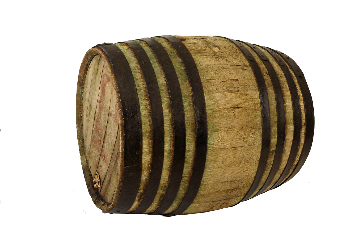 Fotografies dels objectes de l'exposició permanent de la sala "Secà i Muntanya" del Museu Valencià d'Etnologia - Fotografies de Mateo Gamon.